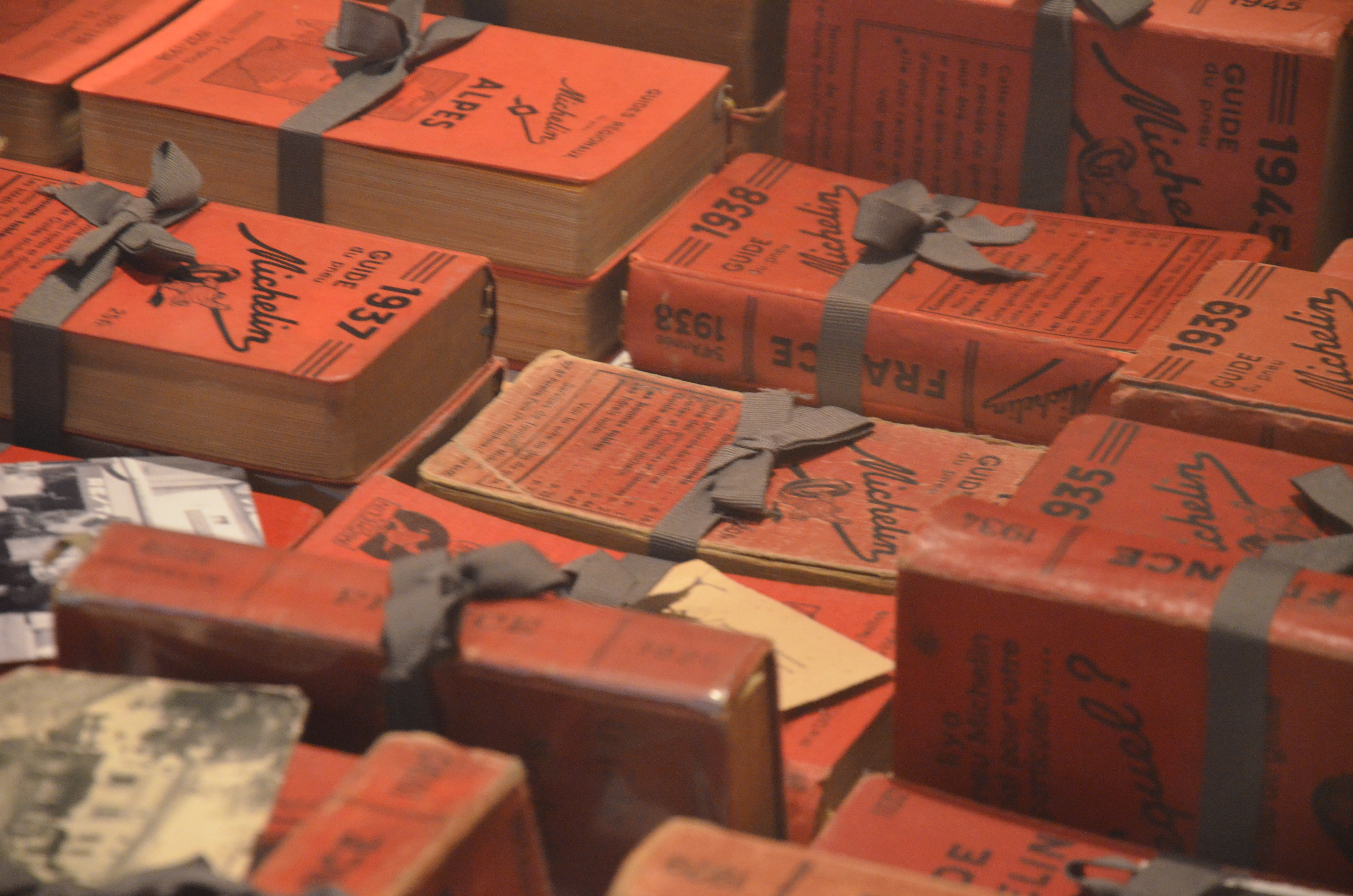 Collection du restaurant Pic à Valence dès les années 1930